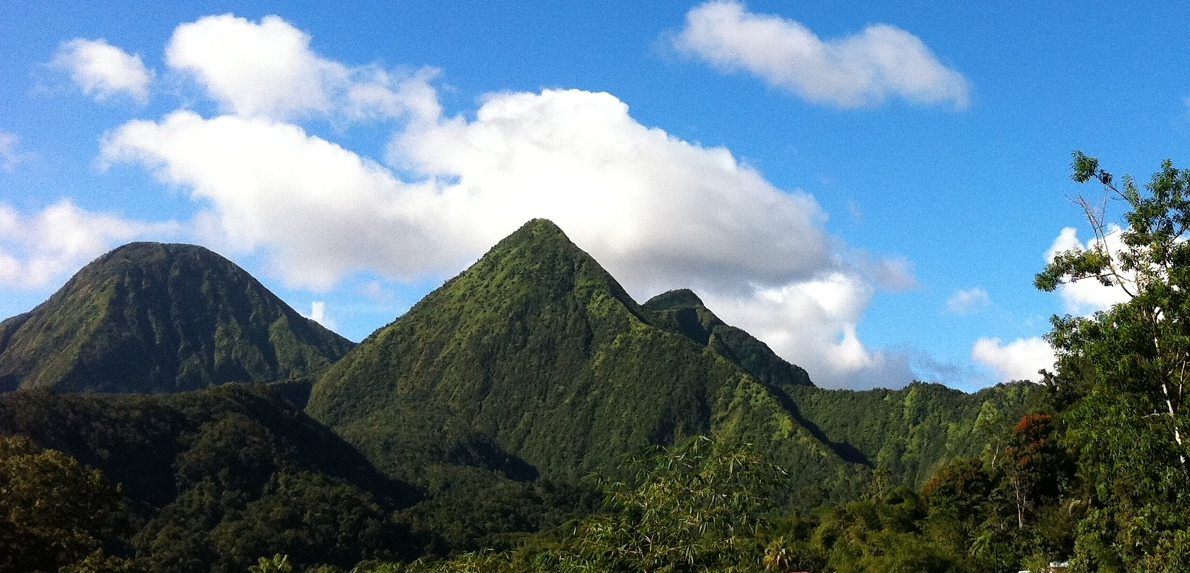 Pitons Lacroix, Dumauzé et de l'Alma, Martinique